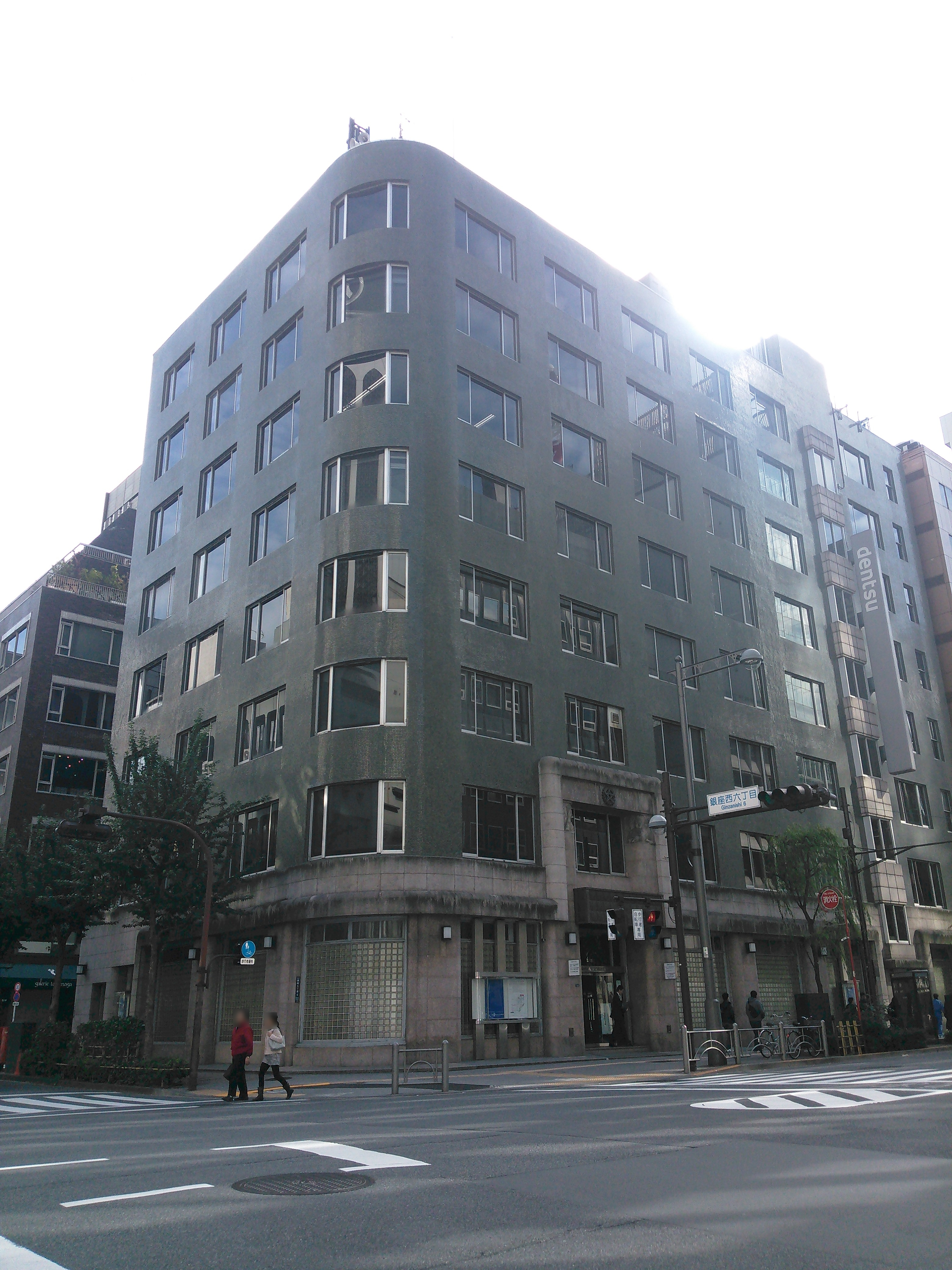 東京都中央区銀座、電通銀座ビル